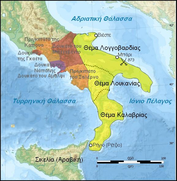 Τα Βυζαντινά Θέματα της Νότιας Ιταλίας περίπου το 1000 (με κίτρινο)